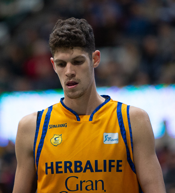 Oriol Paulí, jugador del Herbalife Gran Canaria en partido de liga contra el Divina Seguros Joventut en el Olímpic de Badalona.